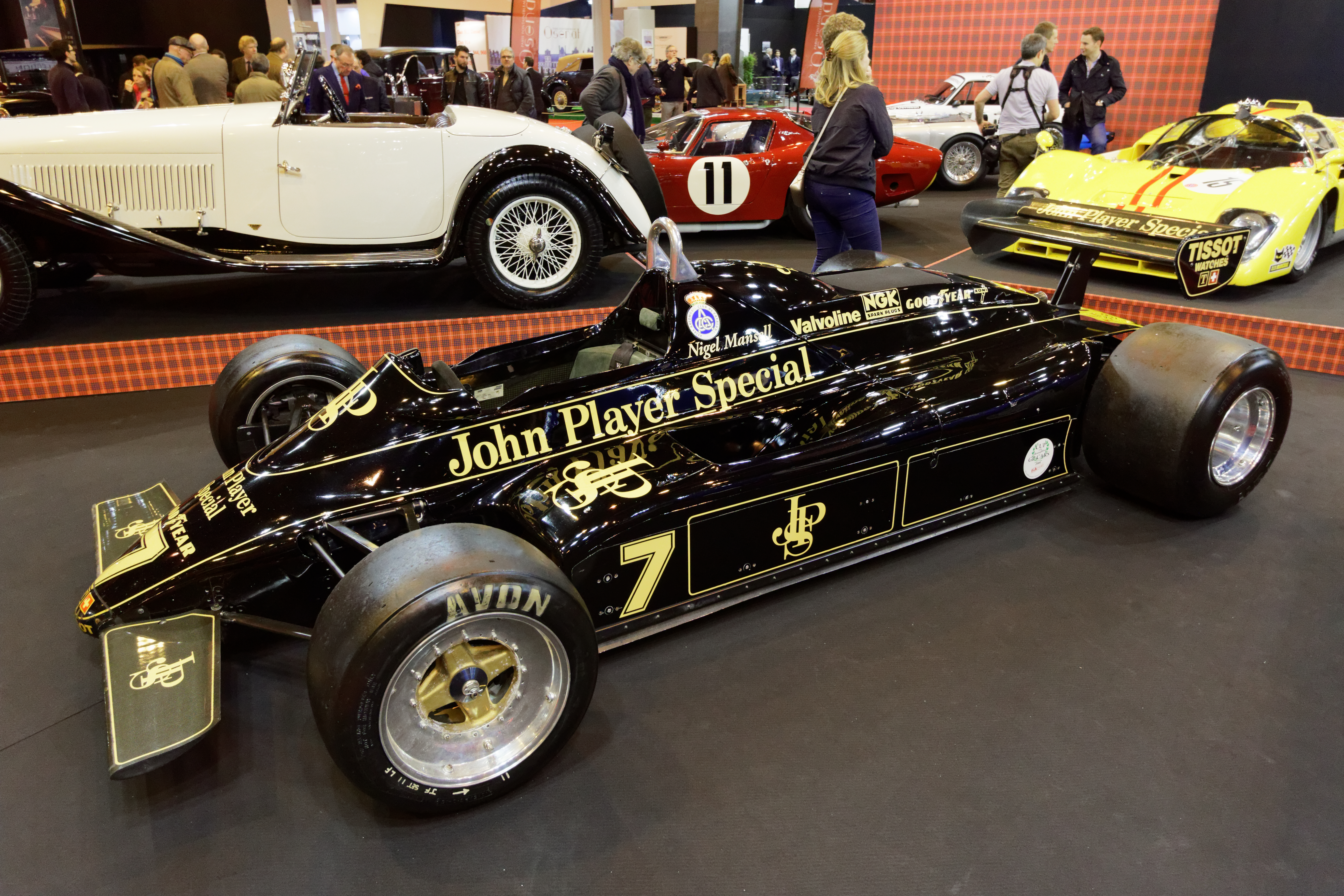 Une Lotus 91-7 de 1982 pilotée par Nigel Mansell exposée lors du salon Rétromobile 2016.